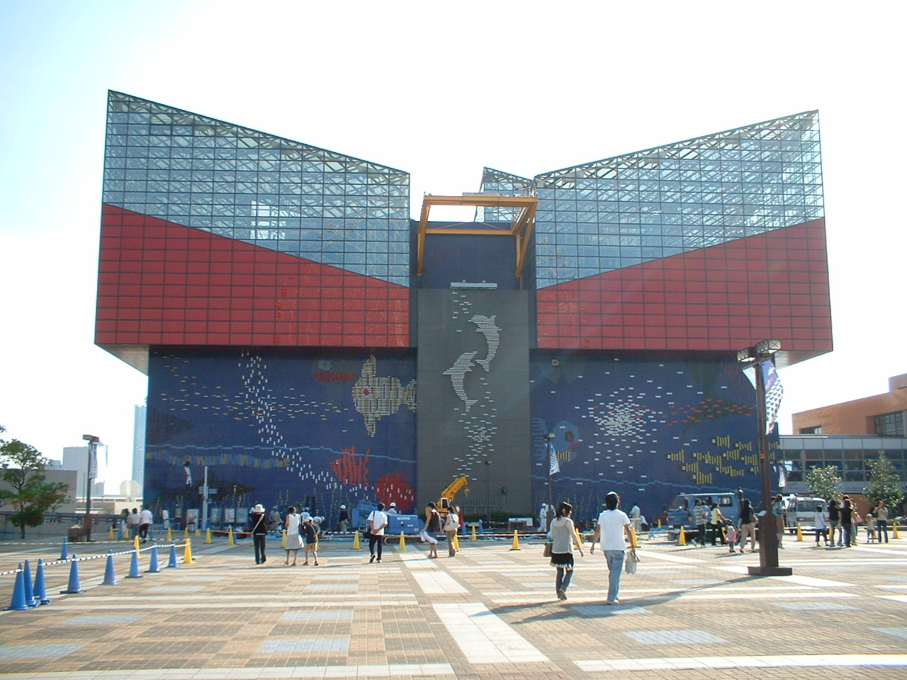 Exterior del acuario de Osaka